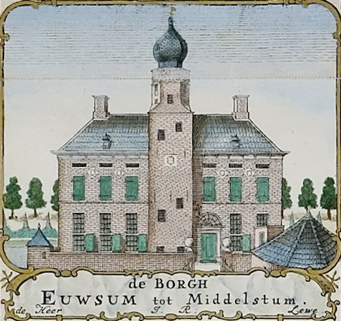 Borg Ewsum in Middelstum. Uitsnede uit de kaart van Theodorus Beckeringh uit 1781